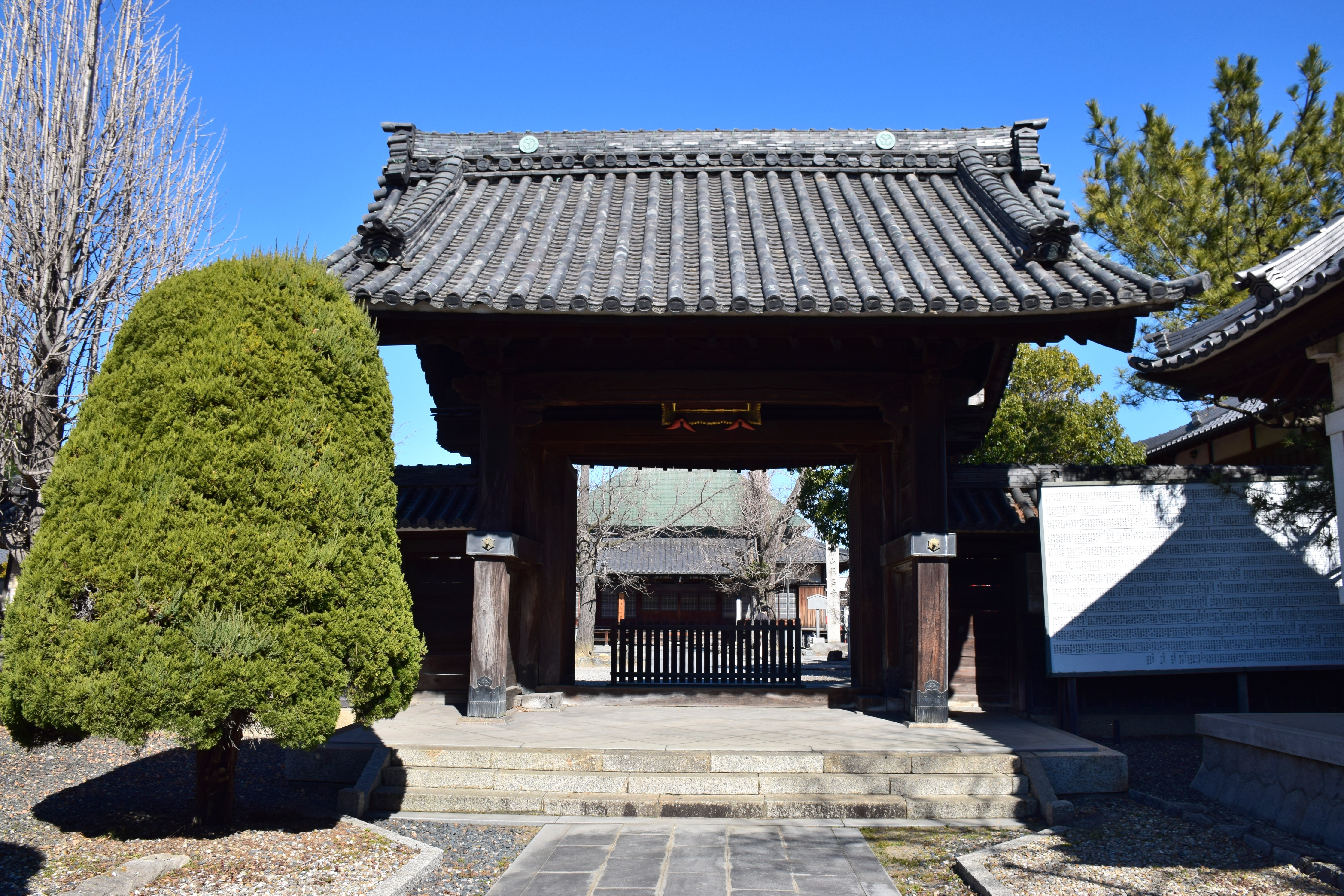 称名寺山門